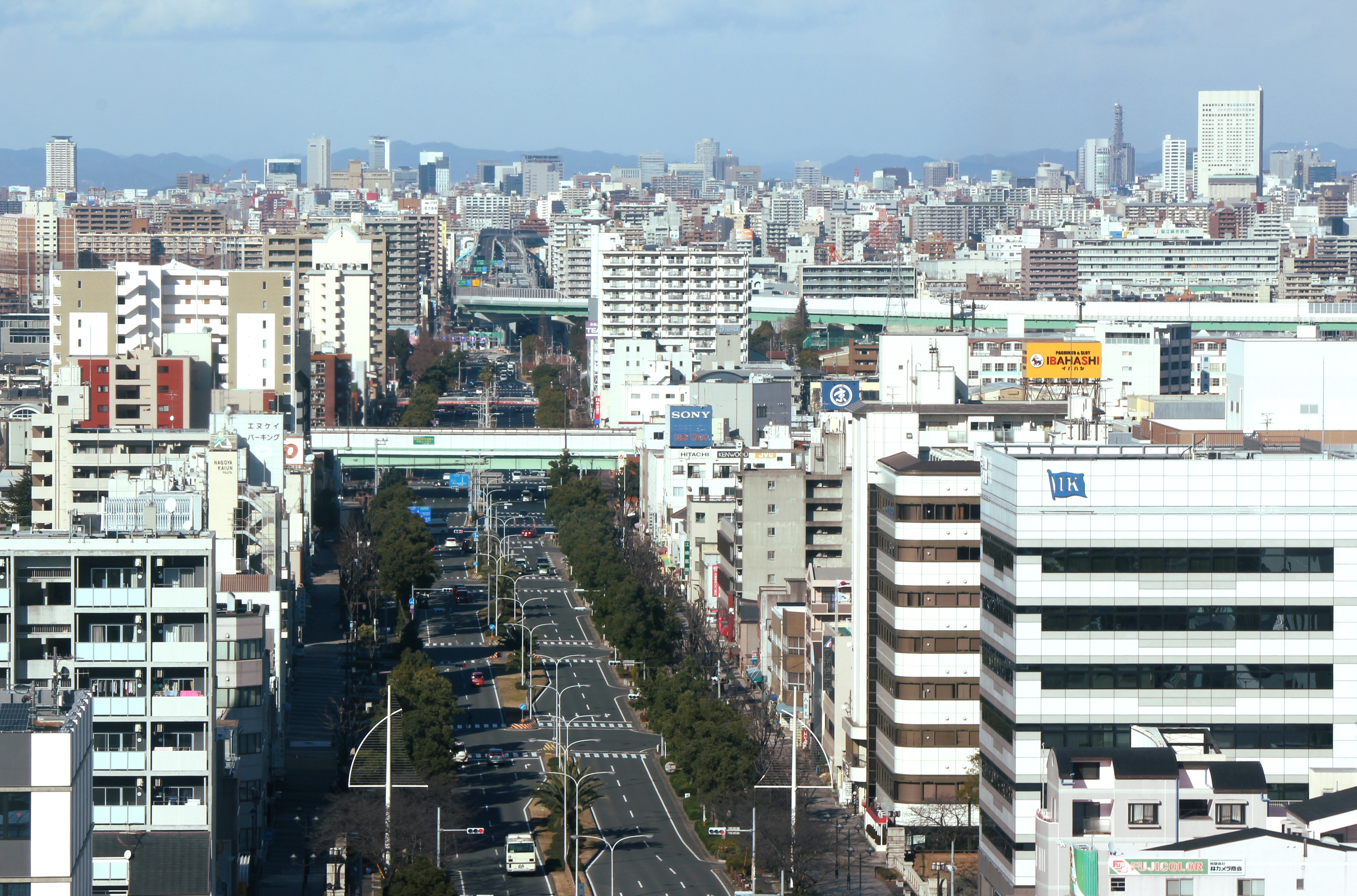 名古屋高速4号東海線港明出入口付近を遠望する。 名古屋港ポートビルから撮影